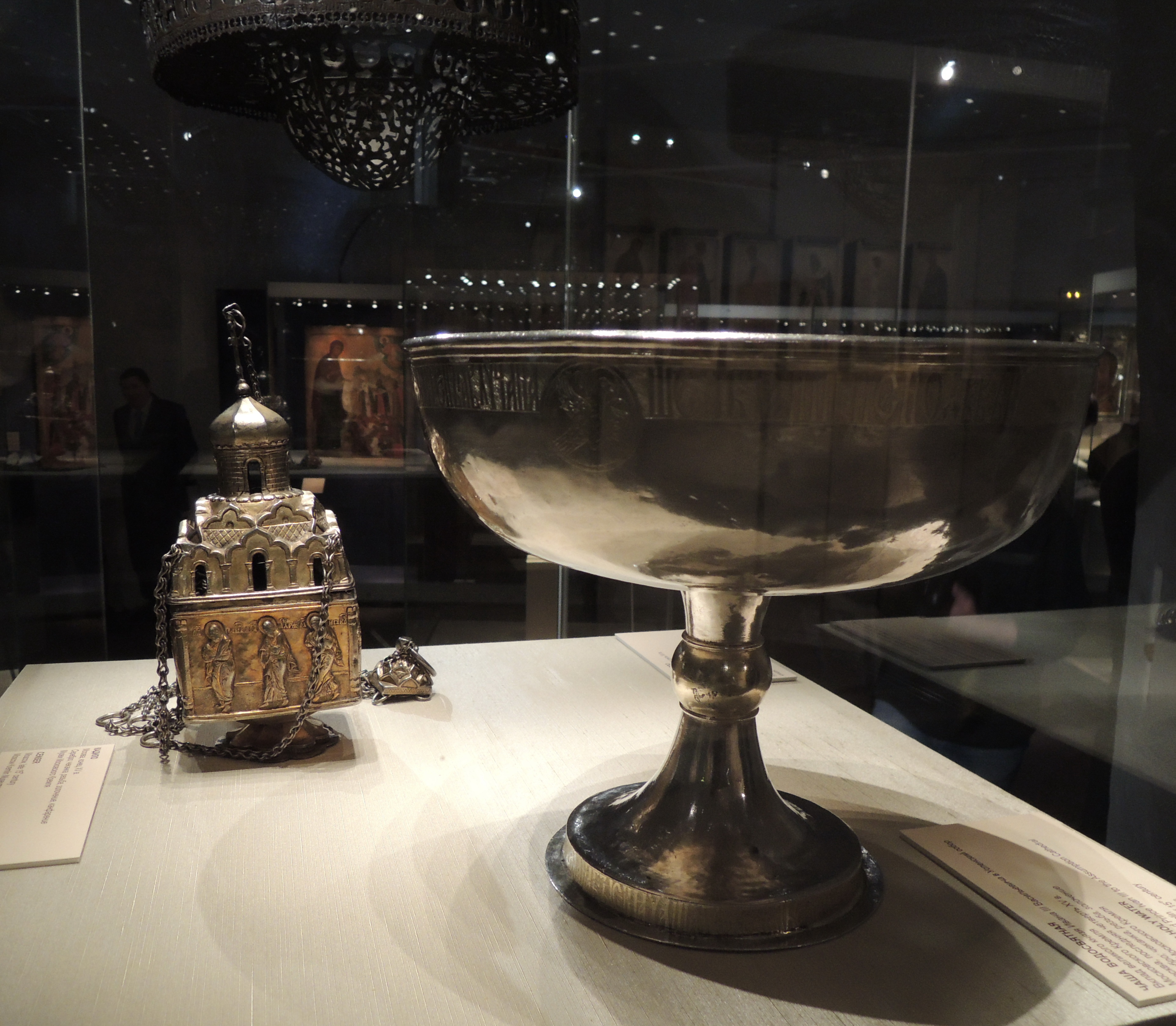 Выставка "Великий князь и государь всея Руси Иван III". Вклад Ивана III в Успенский собор